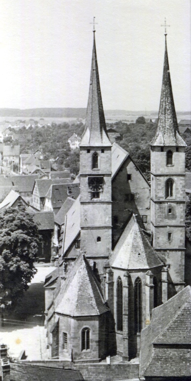 Blick vom Blauen Turm auf die Stadtkirche von Bad Wimpfen im Juli oder August 1939